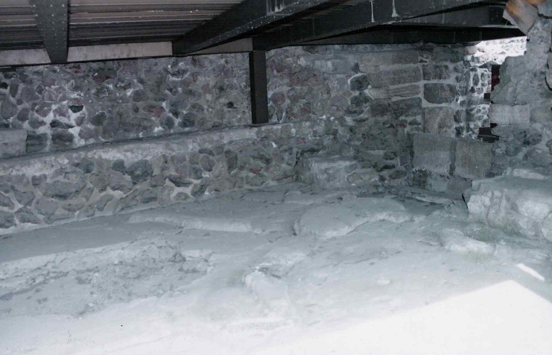 escultura de coyolxauhqui diciembre 2006 en el templo mayor